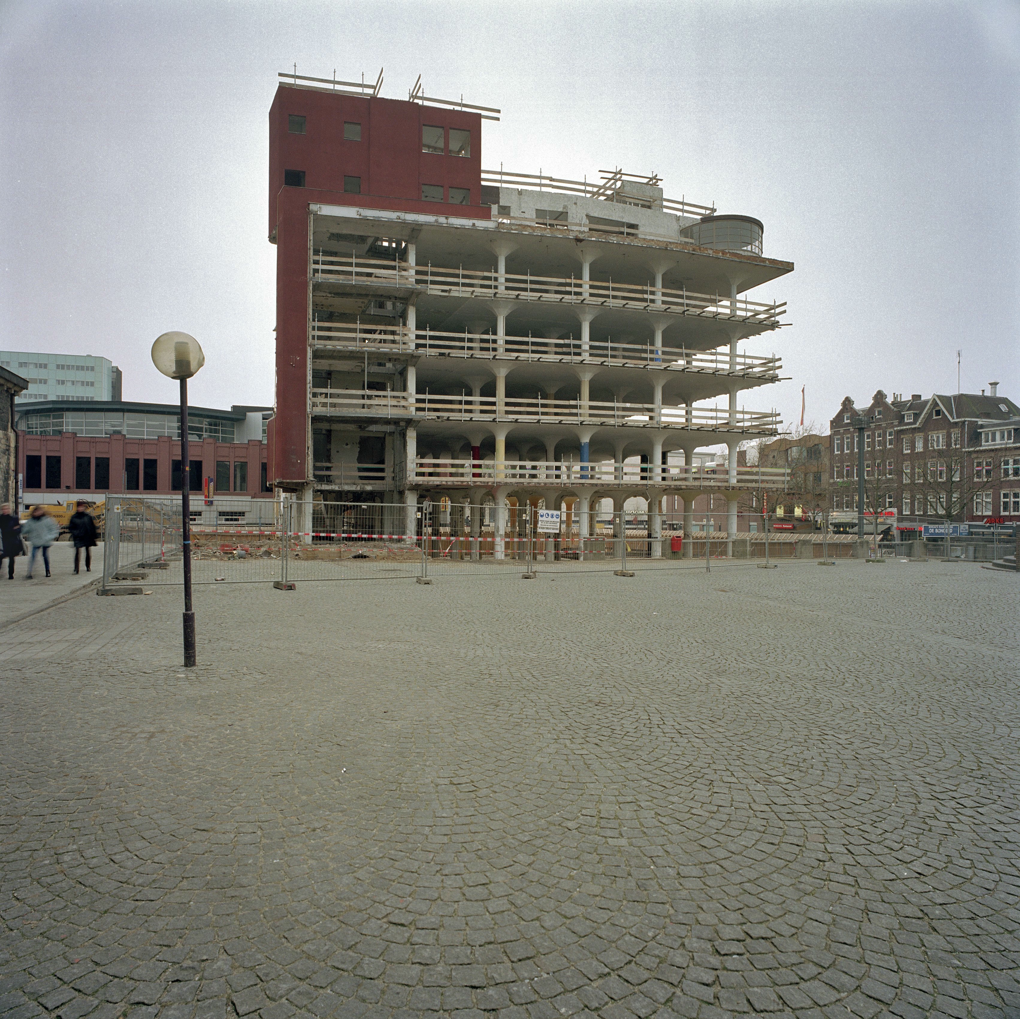 Glaspaleis, Voormalig Modehuis Schunck: Overzicht glaspaleis, tijdens restauratie werkzaamheden